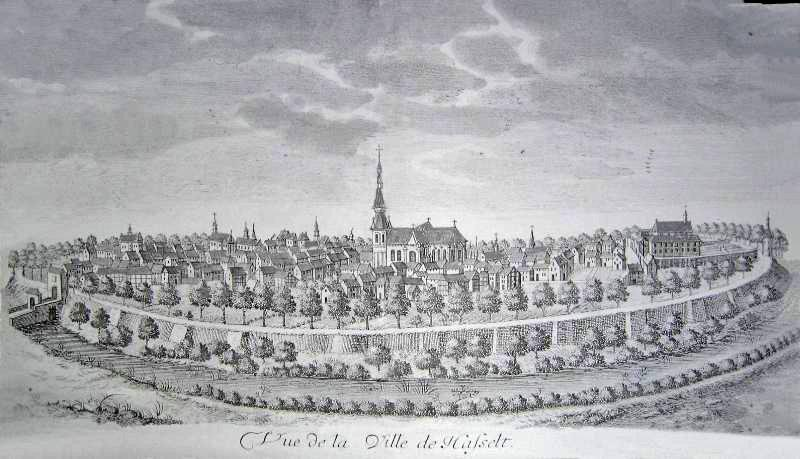 Foto van Gravure naar R. Leloup, in P.L. de Sauery, Les délices du pais de Liège, IV, Luik, 1744